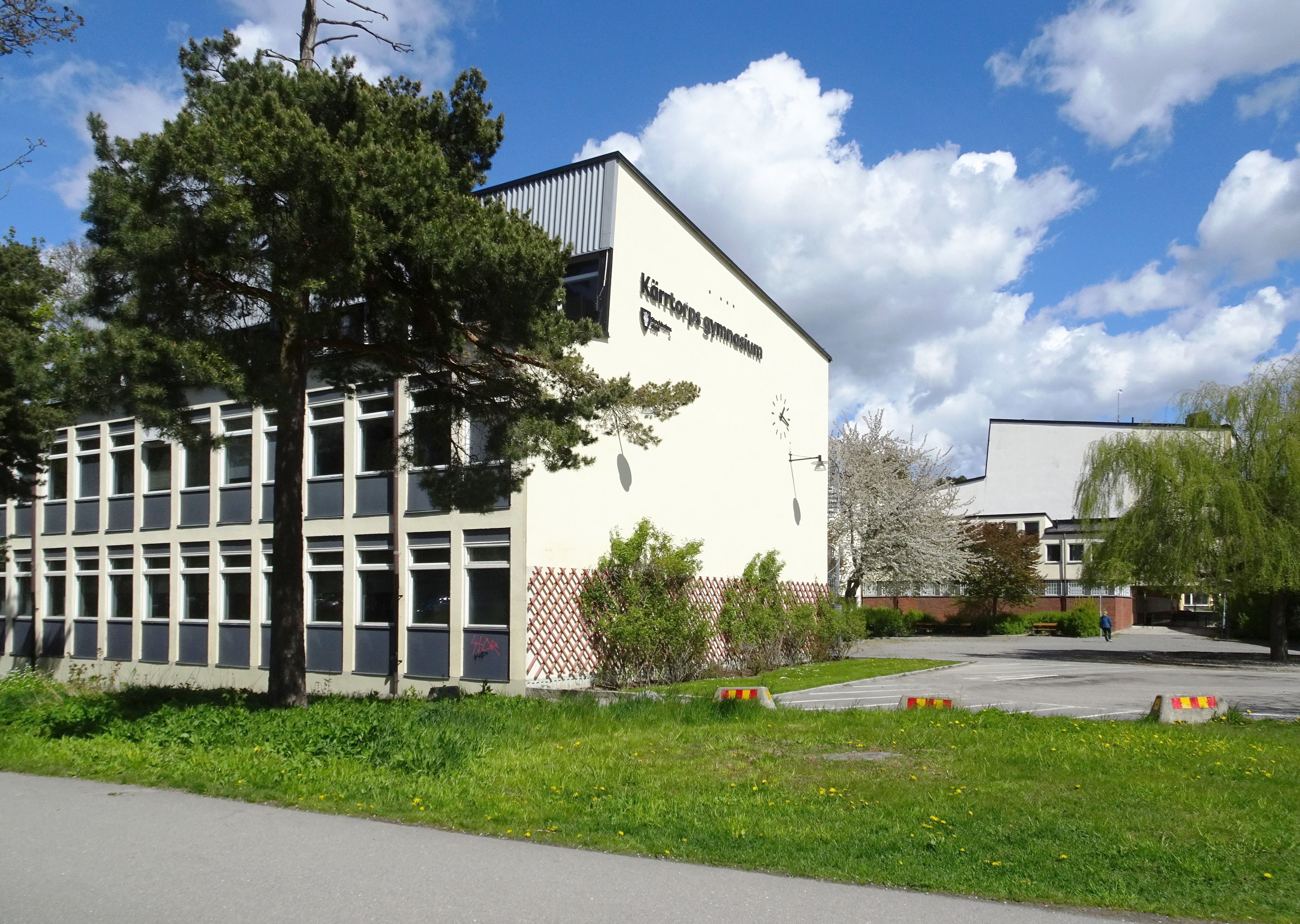 Kärrtorps gymnasium, byggår 1956 - 1959. Bengt Sundh (Byggmästare) Kjell Ödeen (Arkitekt) Stockholms Folkskoledirektion (Byggherre)